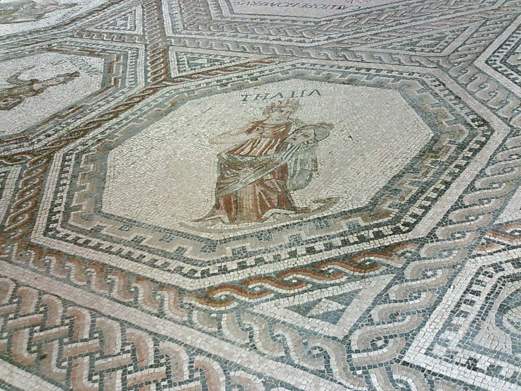 Thalia auf dem röm. Mosaik von Vichten, selbst fotografiert, April 2006, --Xocolatl 03:17, 22 April 2006 (UTC)